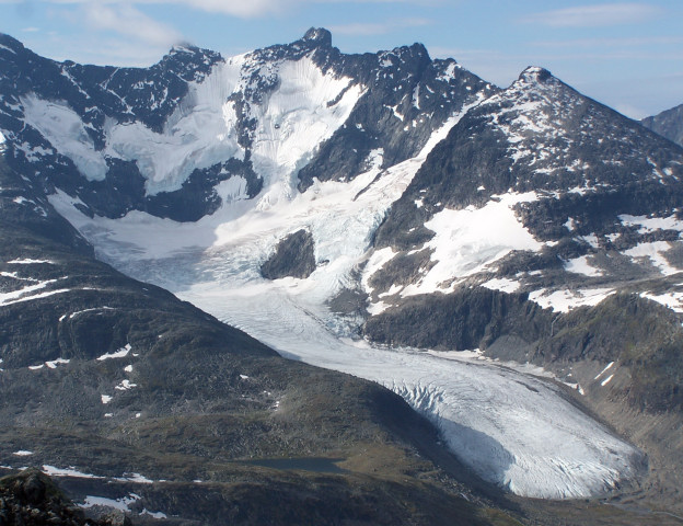 Styggedalsbreen sett fra Fannaråki i august 2004. Foto: Tore Røraas. Névé, cirque d'accumulation et langue glaciaire.